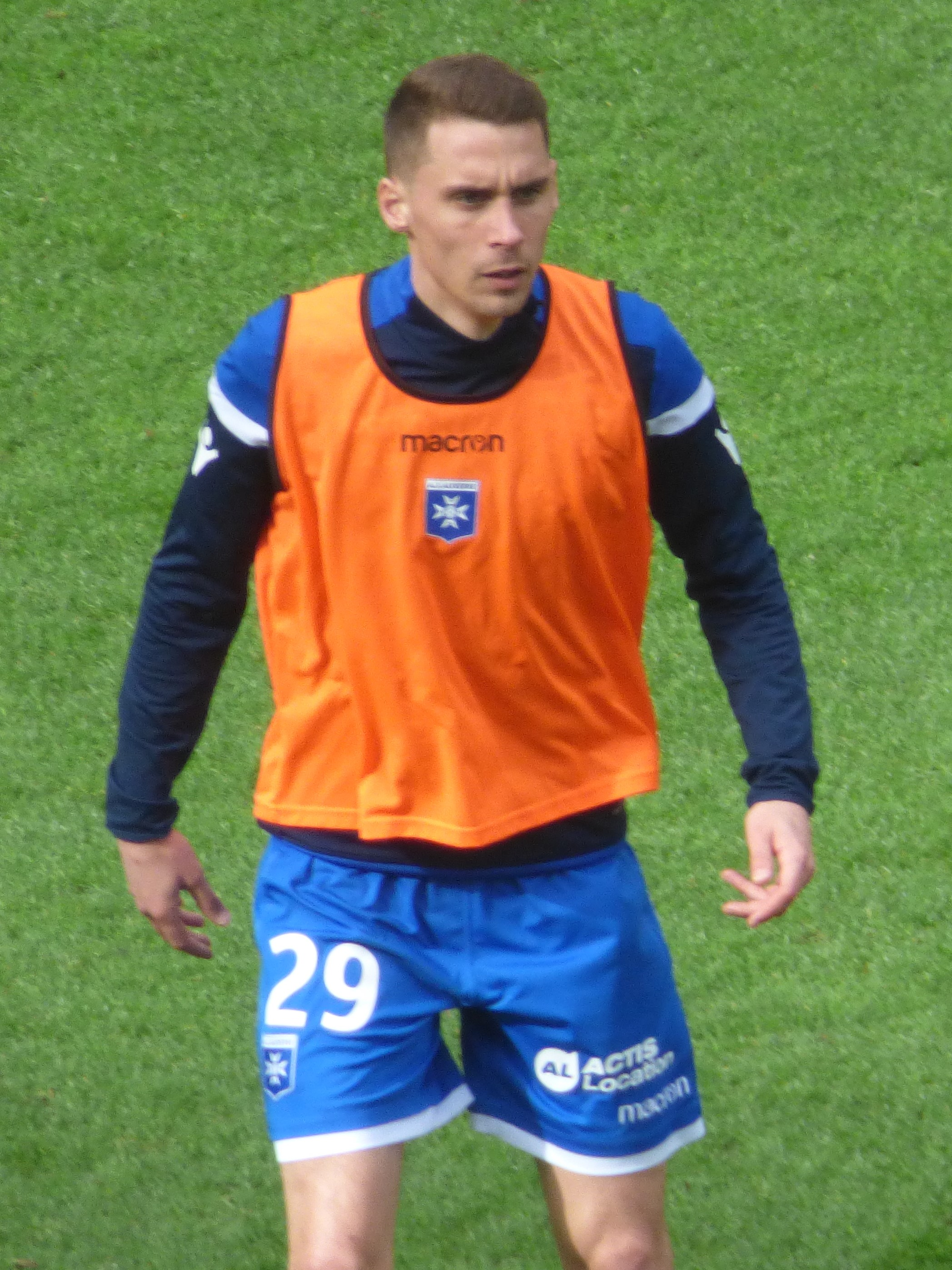 Rémy Dugimont avant le match RC Lens - AJ Auxerre, comptant pour la 28ème journée du championnat de France de football de Ligue 2 2018-2019, le 9 mars 2019 au Stade Bollaert-Delelis.